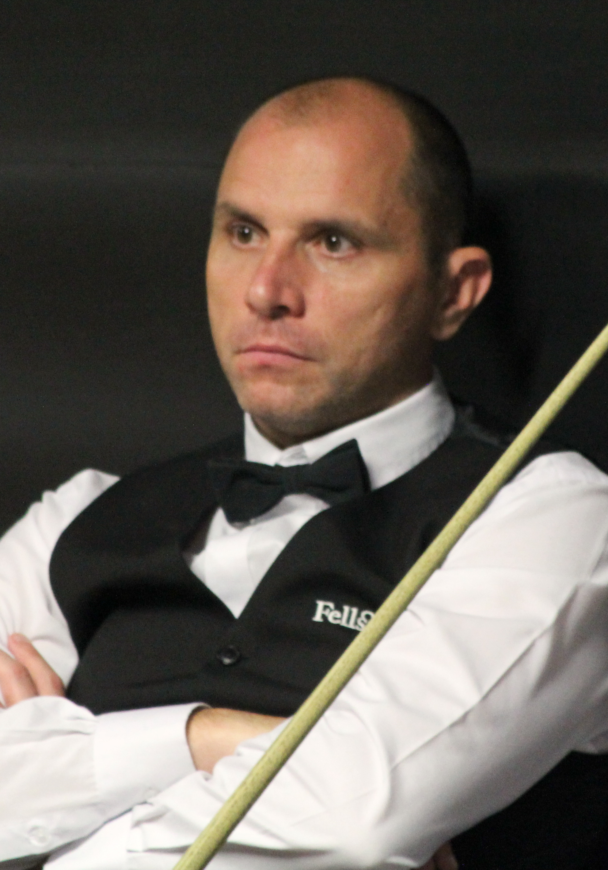 Joe Perry beim Paul Hunter Classic 2016